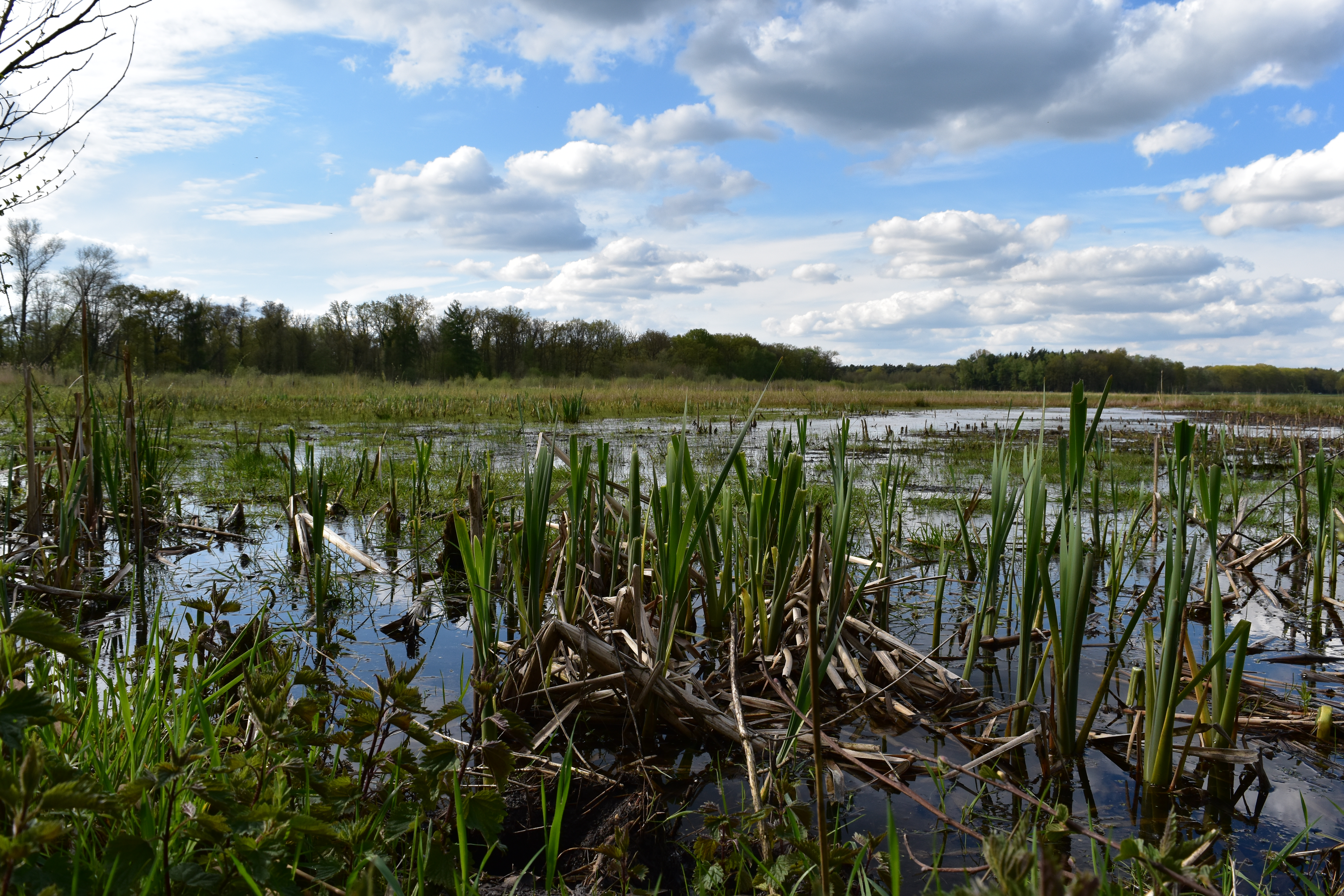 Der Hervester Bruch ist ein Teilgebiet des Naturschutzgebietes Bachsystem des Wienbaches, Dorsten, Nordrhen-Westfalen